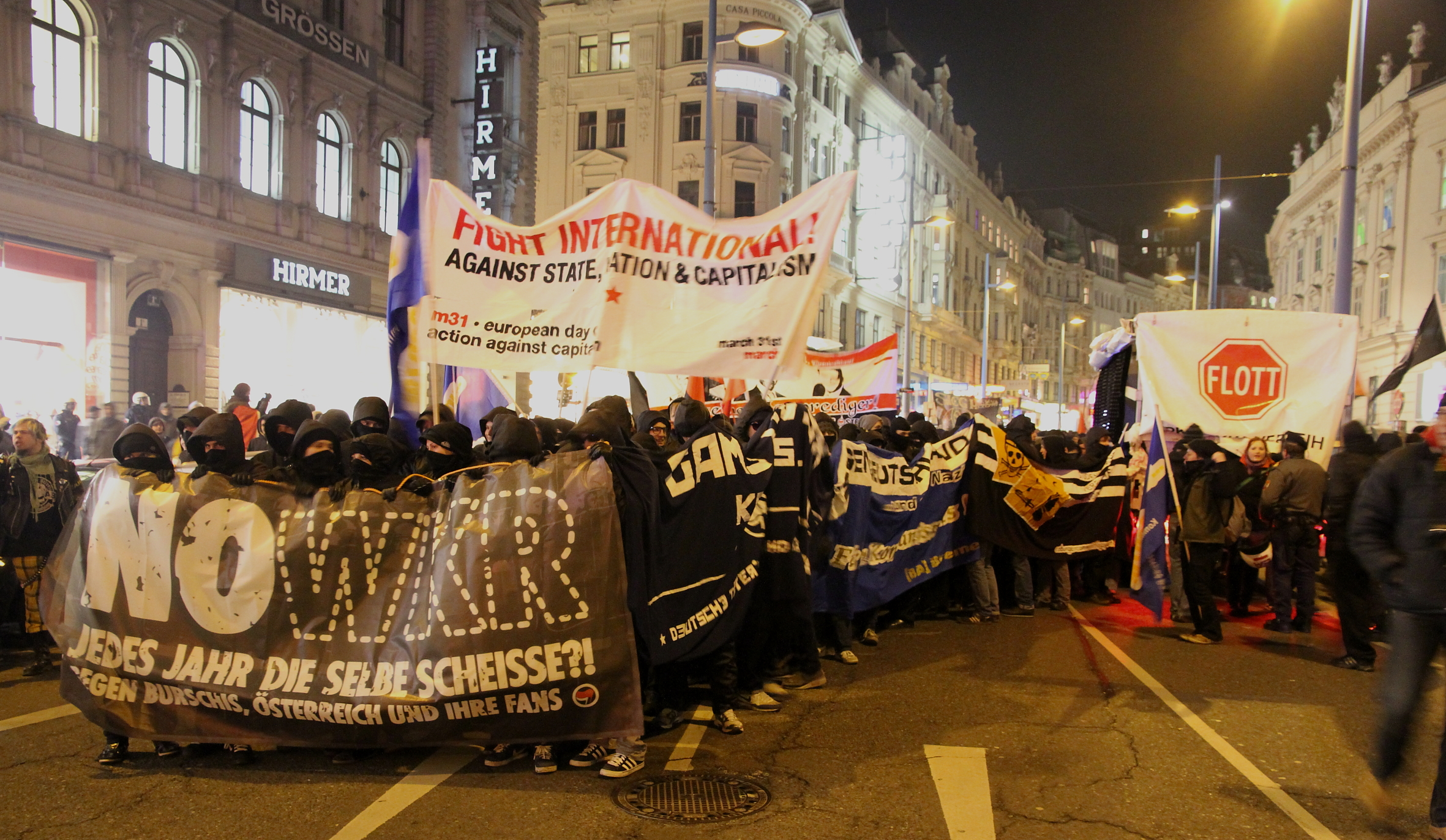 Ein Schwarzer Block aus Deutschland zu Besuch in Wien auf der Mariahilferstraße bei einer Demo gegen den Wiener Korporations-Ball.